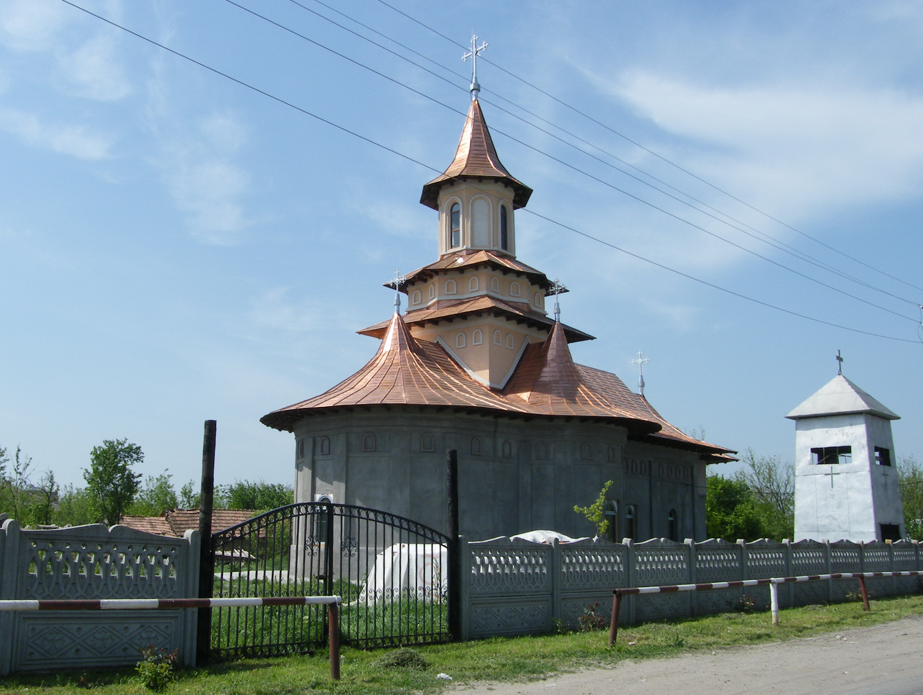 Biserica Sfantu Dumitru din satul Bordei Verde in renovare Restricţii - fără restricţii